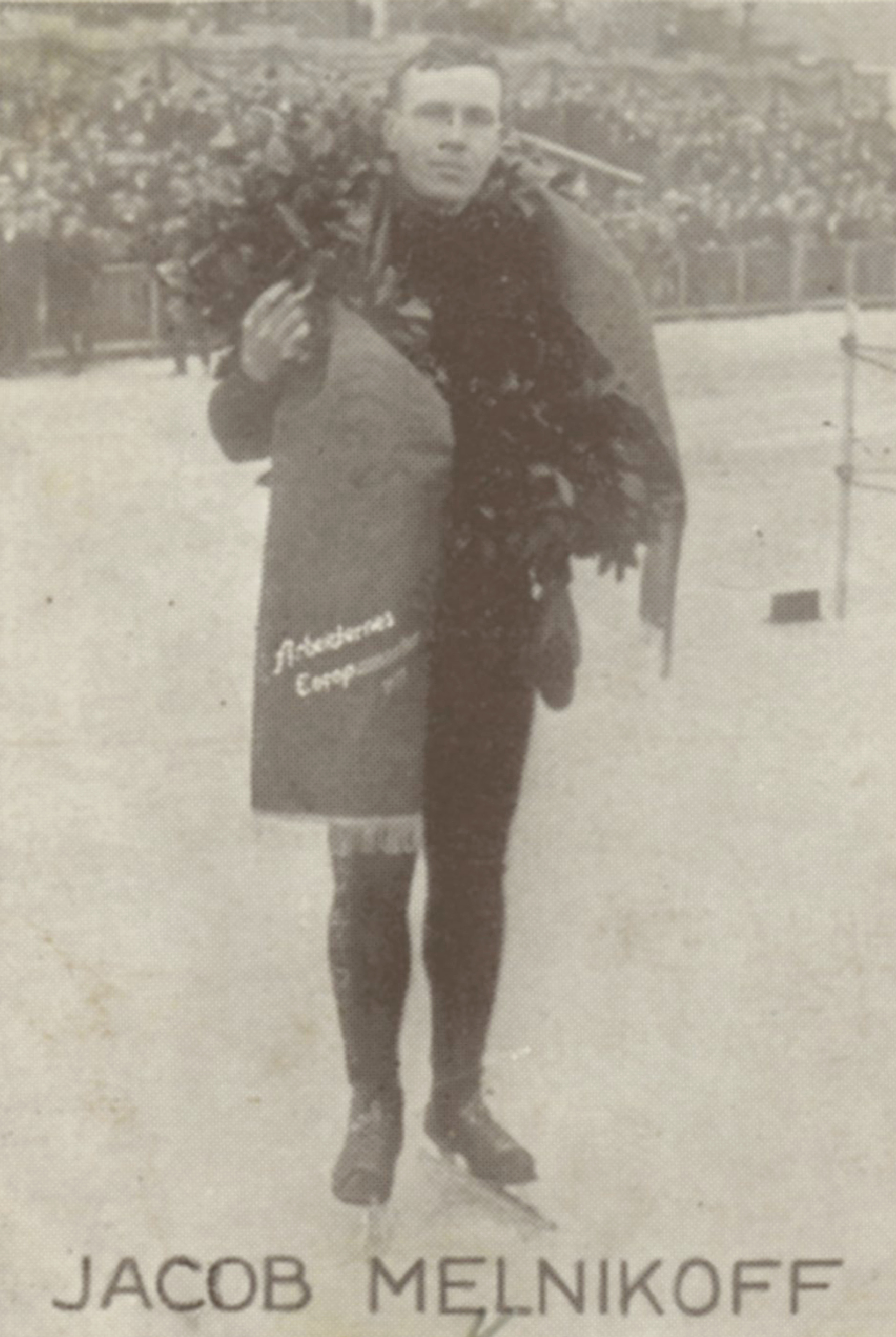 Format: Samlekort Dato / Date: ca. 1930 (dokumentet) Fotograf / Photographer: Ukjent Eier / Owner Institution: Trondheim byarkiv, The Municipal Archives of Trondheim Arkivreferanse / Archive reference: Sportsklubben Freidig: Sigarettfoto ca. 1930 (Løpenr. 75) F23939 Tekst på baksiden: Jacob Melnikoff er en av Russlands aller fremste skøiteløpere og har deltatt i mange store løp her i Norge. Mange vil huske hans deltagelse i de store løp i Oslo, hvor han særlig gjorde sig bemerket i de lengste distanser over 5000 og 10000 meter. Merknad: Disse samlekortene med bilder av norske og internasjonale idretthelter fulgte med i sigarettpakker på 1920 og 30-tallet - derav tobakksreklamen på baksiden. Samlekortene kommer fra Sportsklubben Freidigs arkiv, og inneholder nærmere 90 unike kort pent plassert i et samlealbum. Samleren var den senere skipsmegler Finn Følling (1914 – 1985).